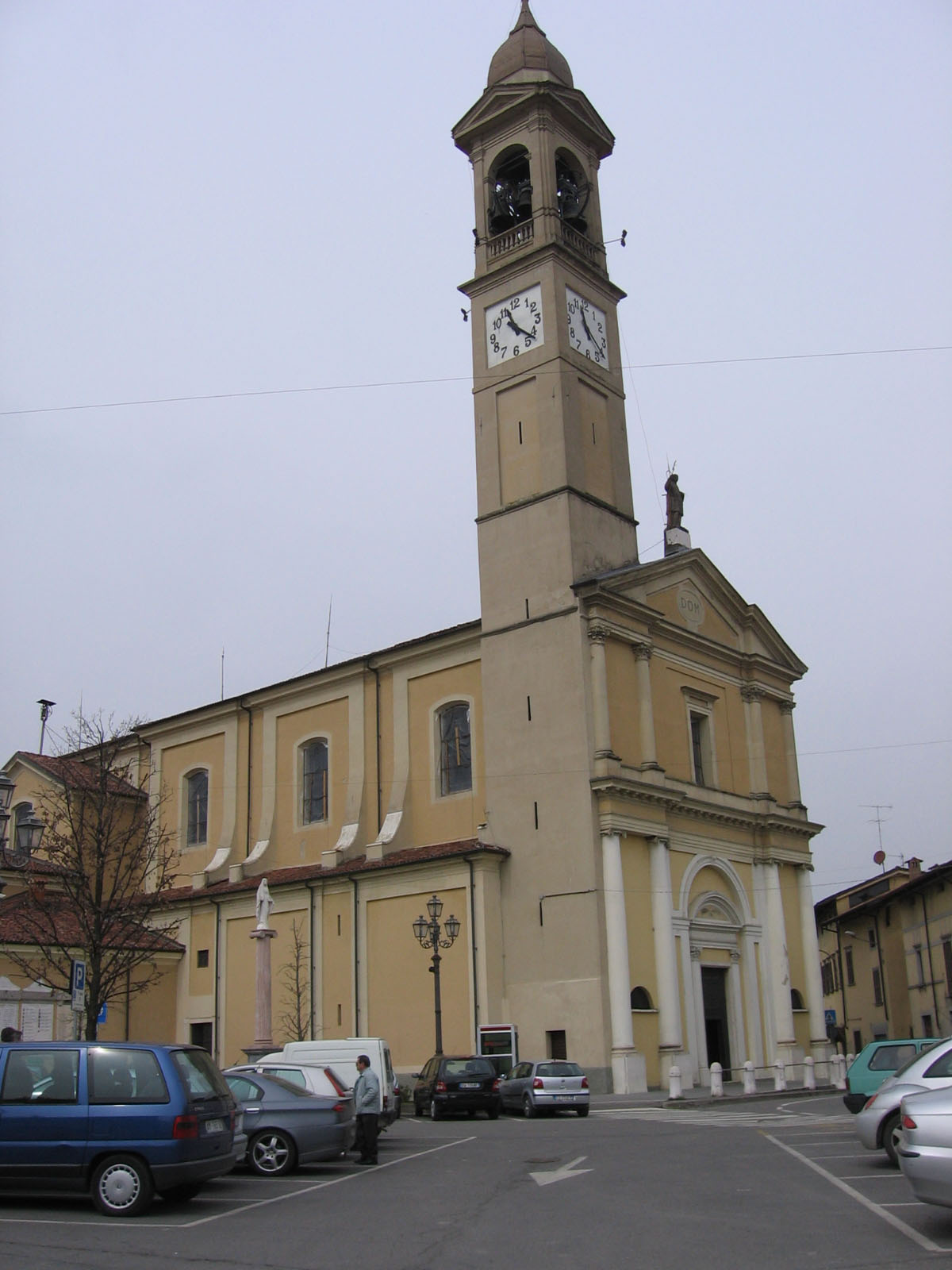 Palosco, Bergamo, Italia